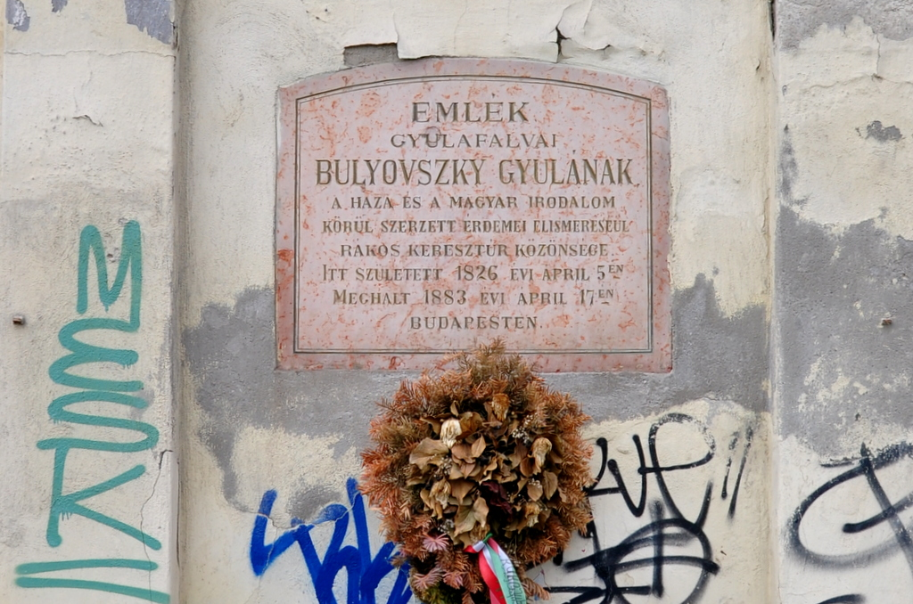 Bulyovszky Gyula emléktáblája egykori szülőházán (Budapest, 17. kerület, Pesti út 107.)